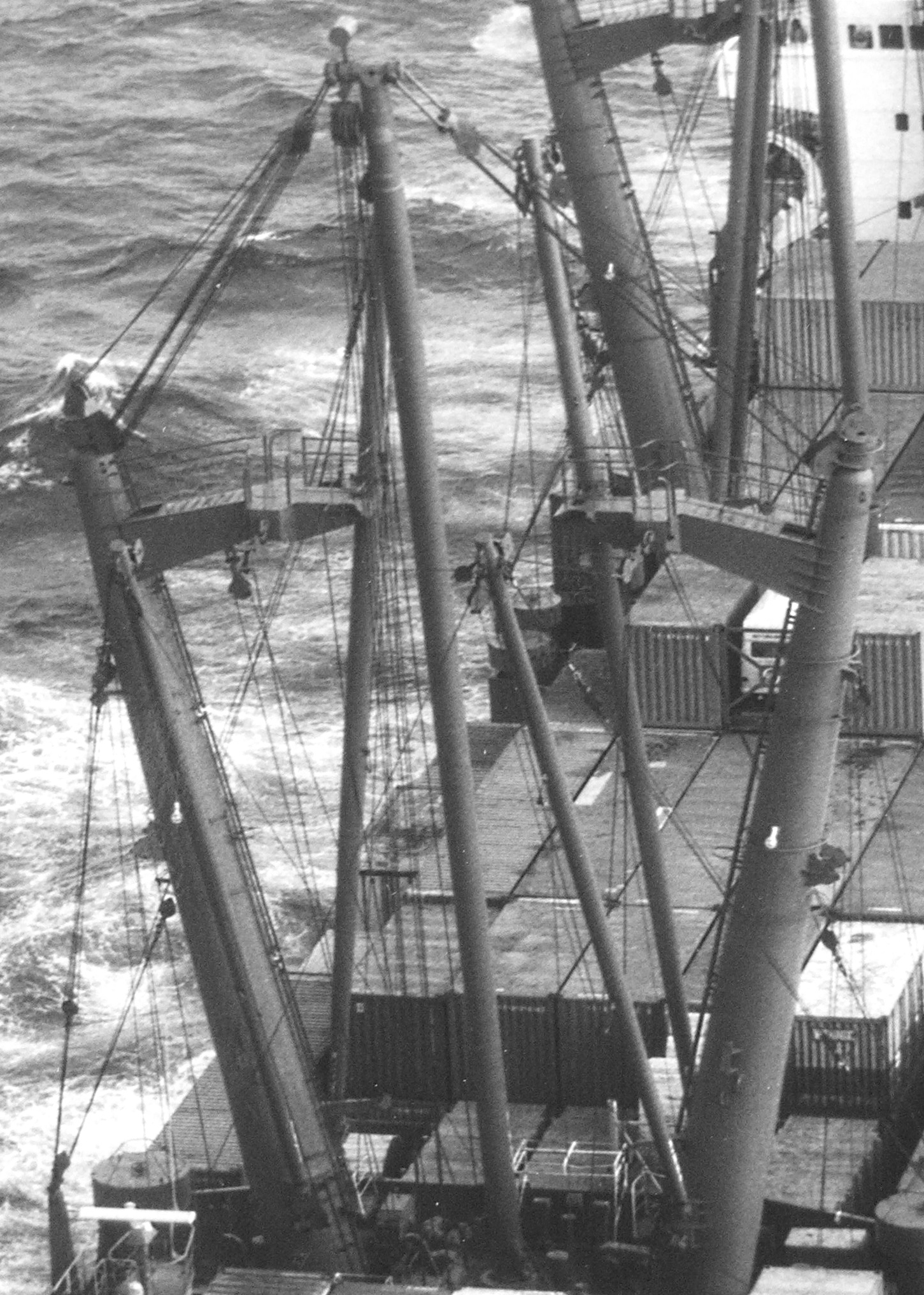 Stülckenmast auf einem Liberty-Ersatzschiffsbau